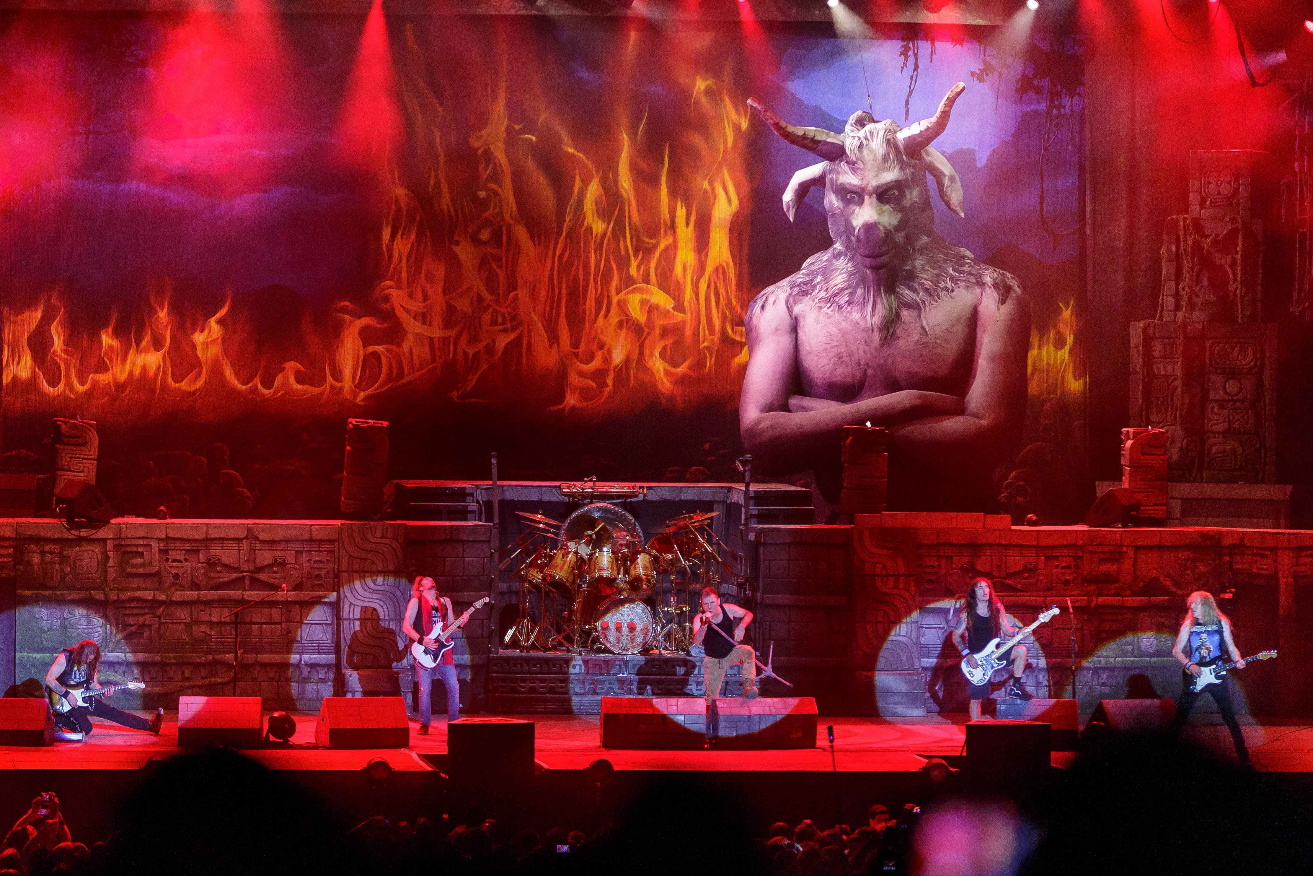 Paléo Festival Nyon, édition 2016, 19-24 juillet 2016. Mercredi 20: Iron Maiden (heavy-metal, Grande-Bretagne)